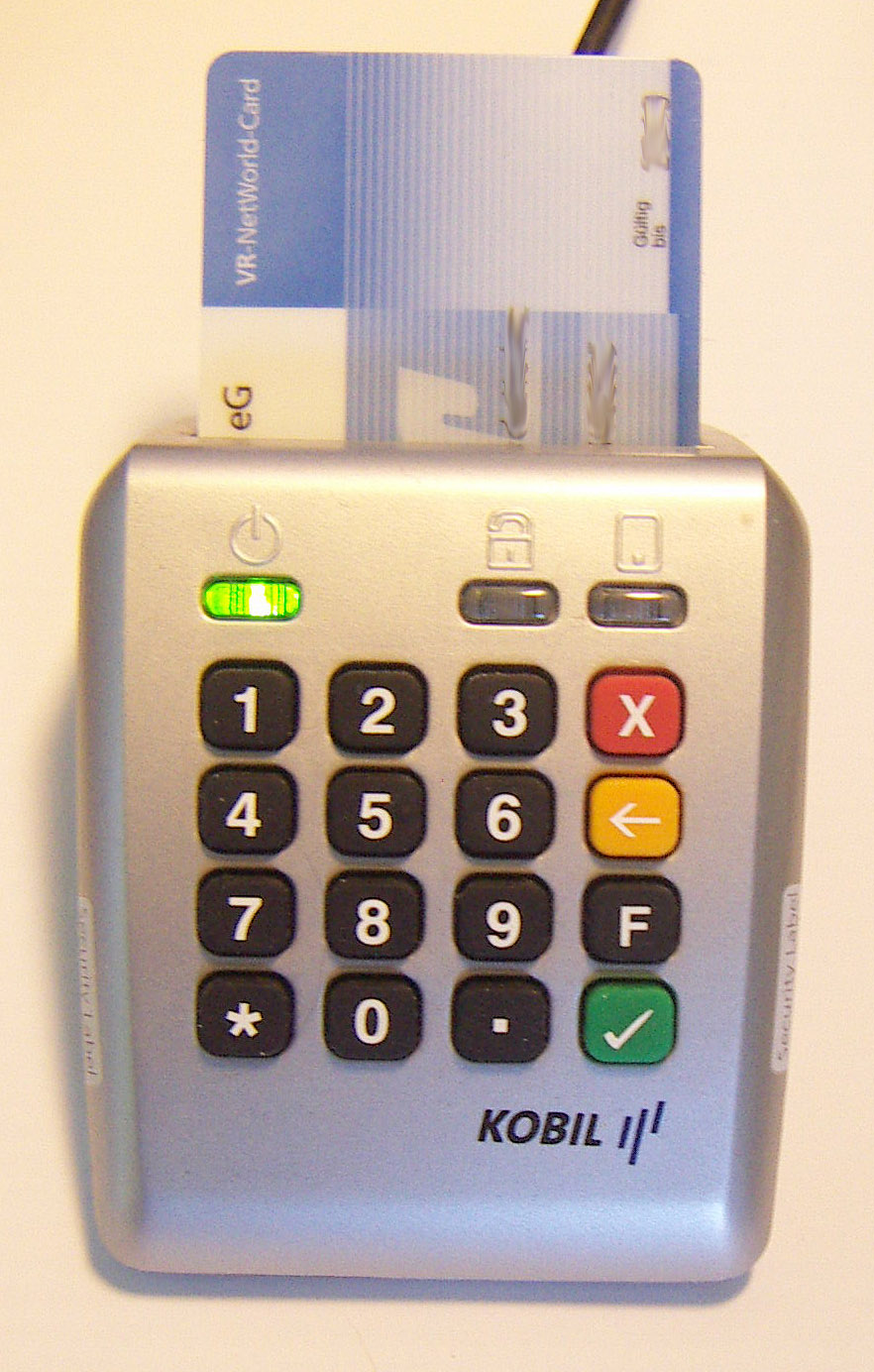 chipkartenlese fürs Internetbanking, klasse 2